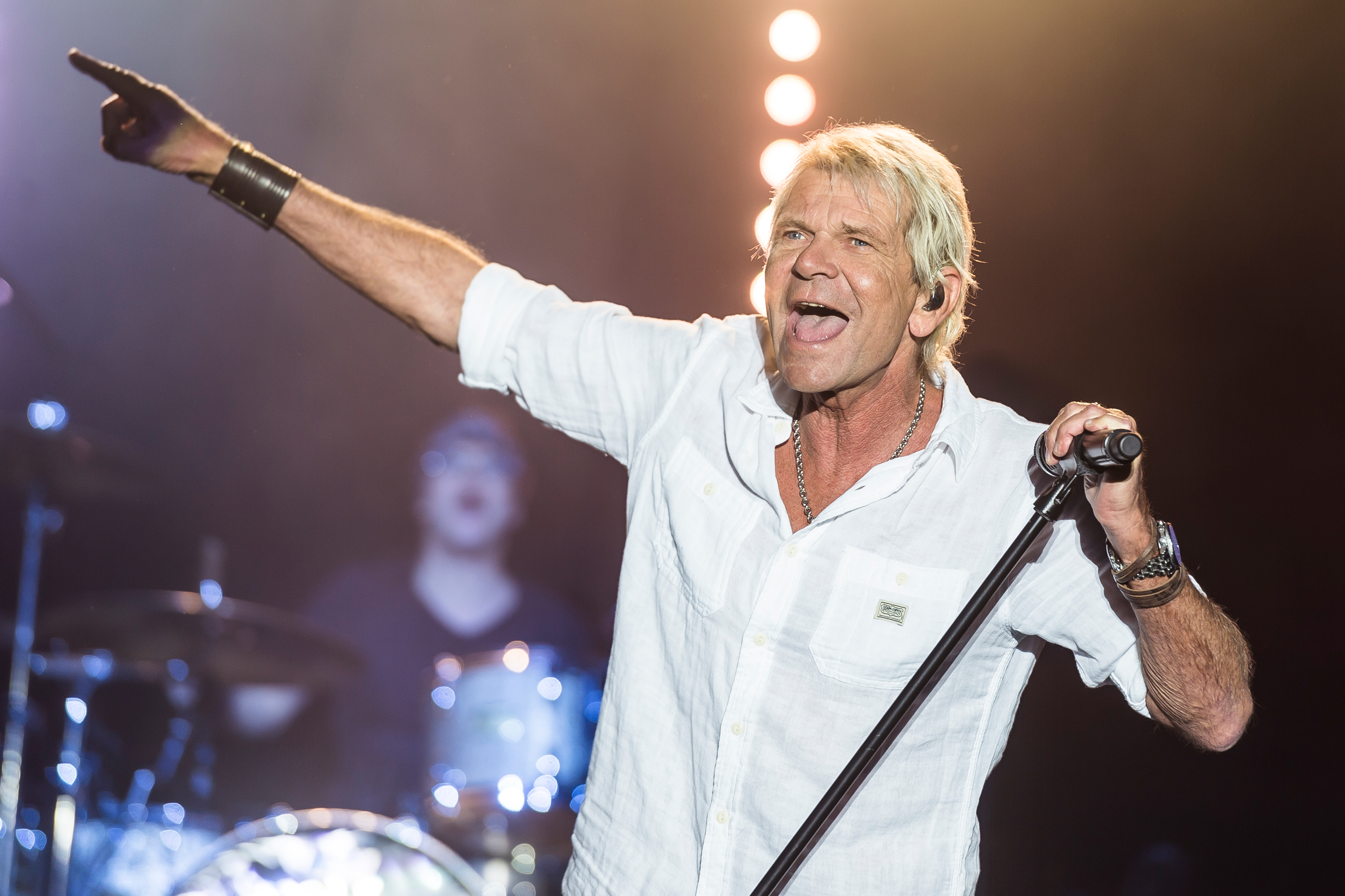 Der deutsche Sänger Matthias Reim beim Konzert am 13.11.2016 in der Jahrhunderthalle Frankfurt am Main.